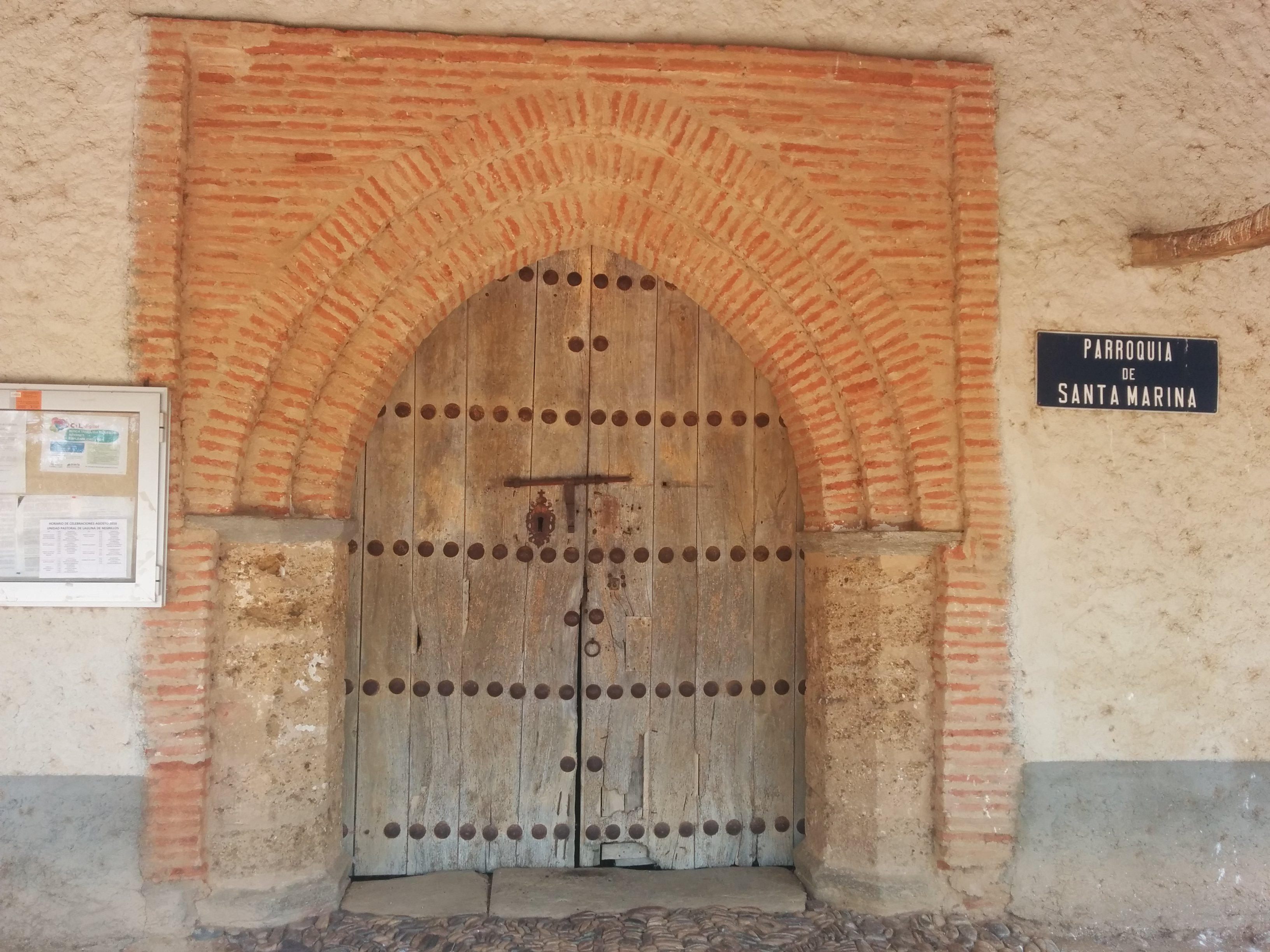 Puerta de la parroquia de Santa Marina (Cazanuecos)